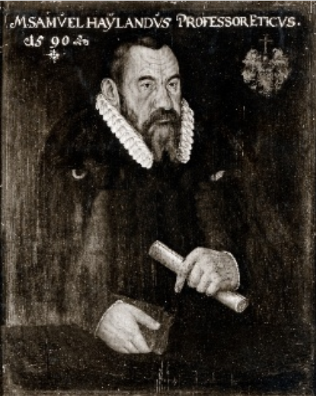 Prof. Samuel Heiland, Gemälde in der Tübinger Professorengalerie